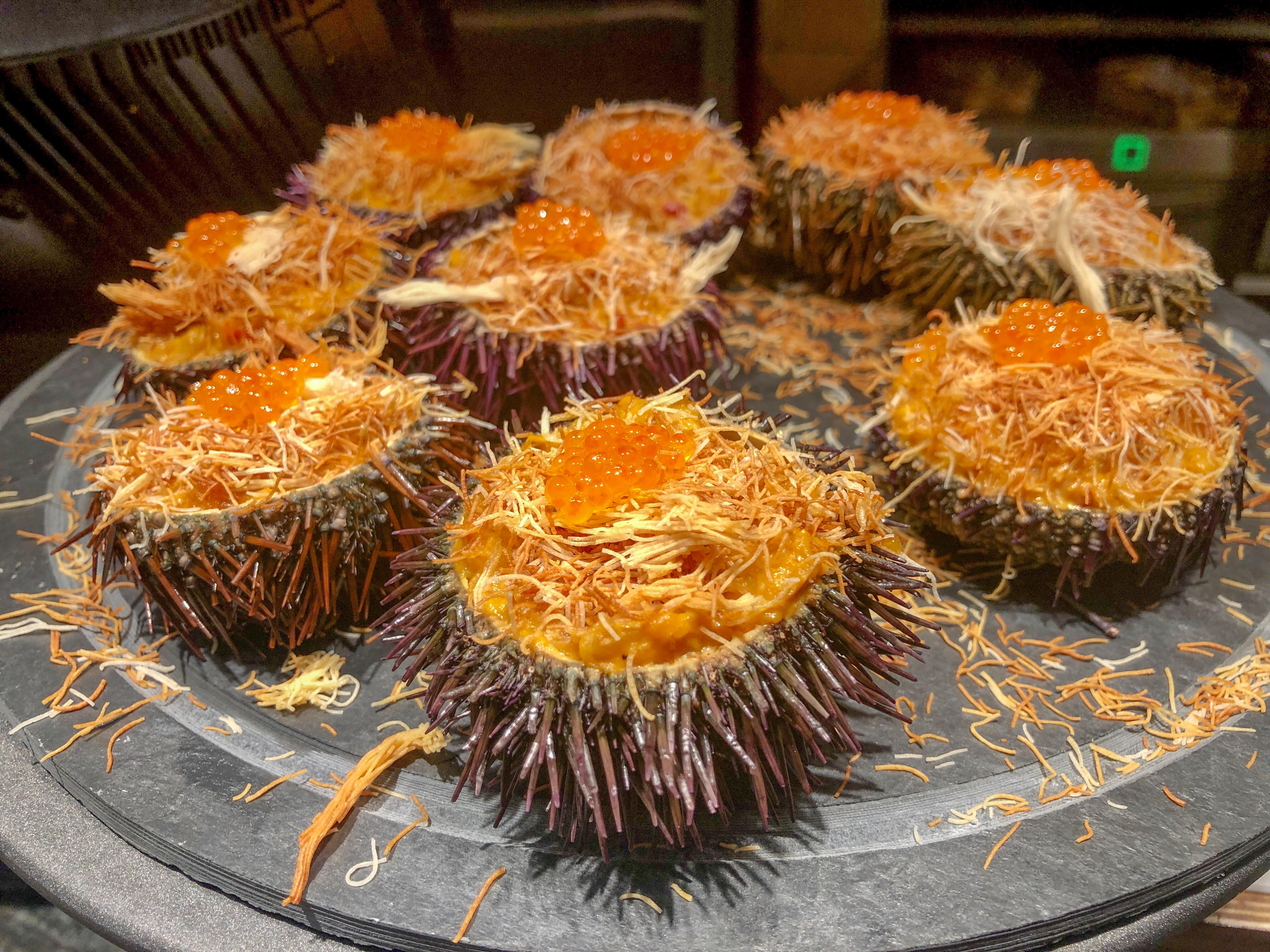 Plato en San Sebastián.